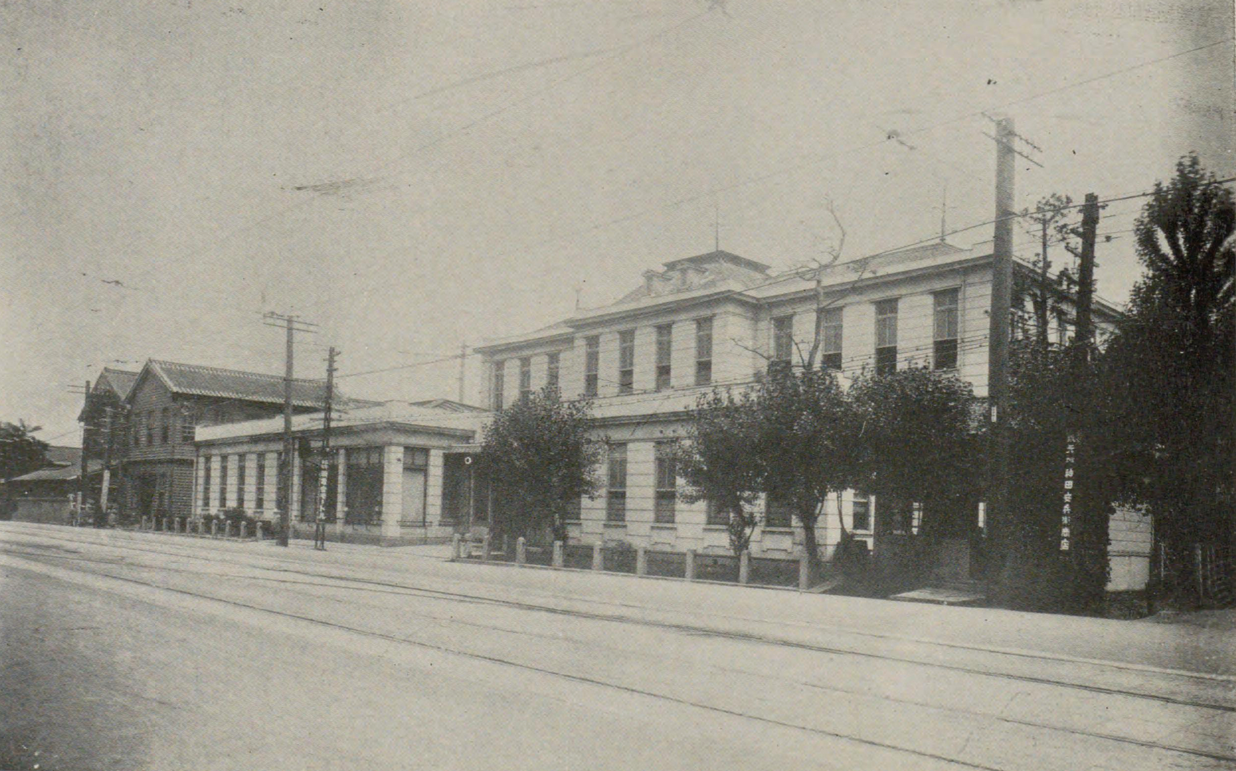 九州電気軌道の本社（1911 - 1940年）。小倉市京町（現・小倉北区）所在。